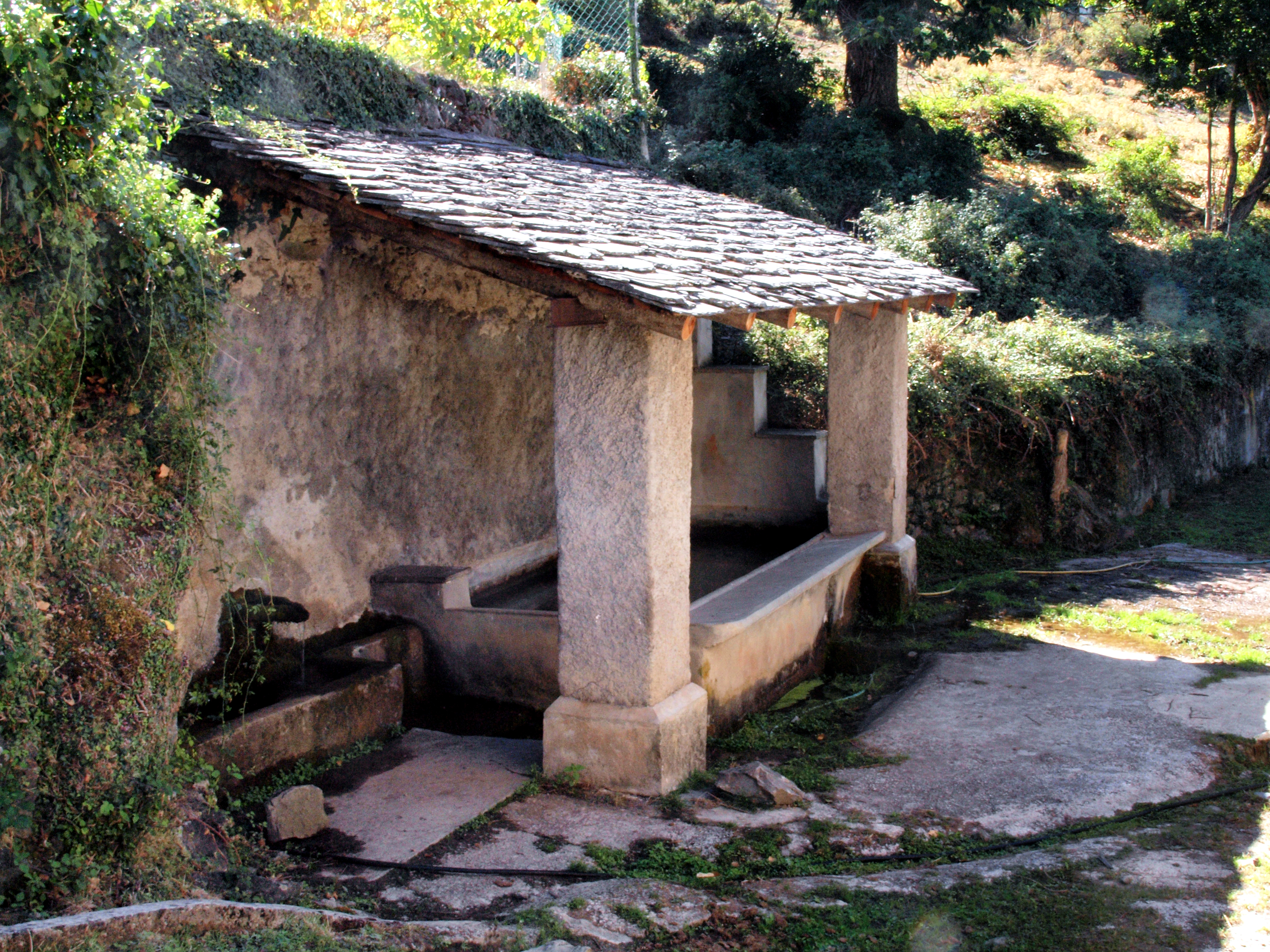 Érone, Casaluna (Corse) - La fontaine-lavoir du village